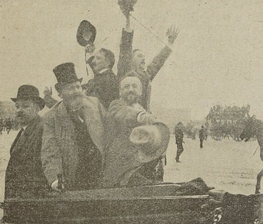 "Le jour de la rentrée des chambres (instantané du Pèlerin)".